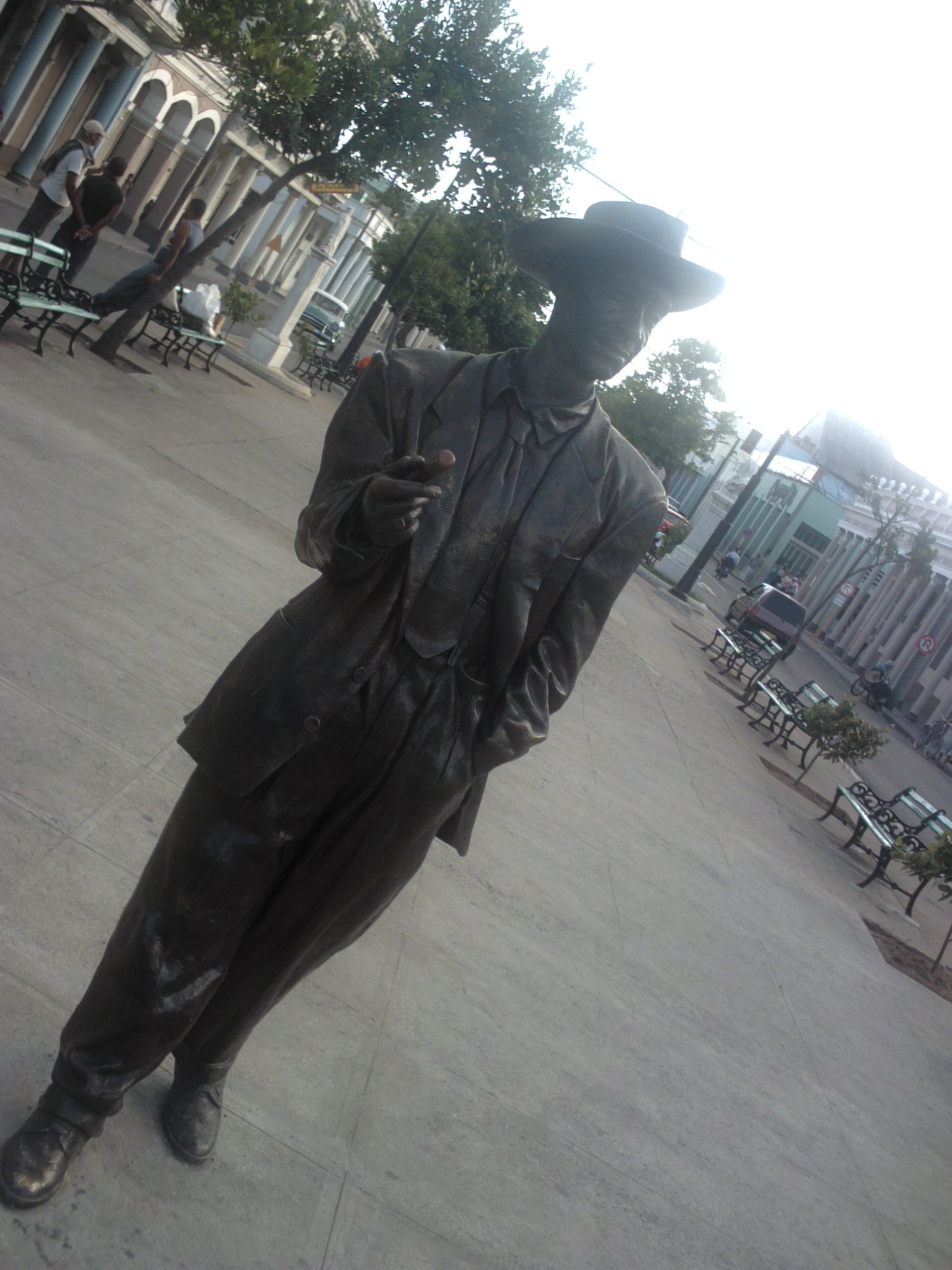 Escultura de Benny Morè en Cienfuegos, Cuba tomada por Jeanpier Anaya , osea yo mismo